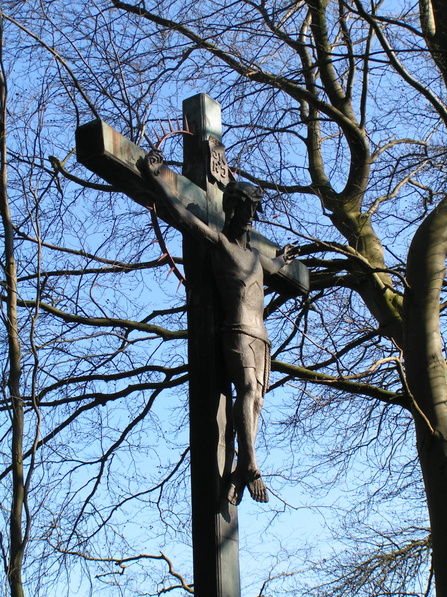 Station 12 (Kreuz mit Korpus aus Bronze) auf dem Kreuzweg bei St. Anna Klus in Südlohne (Stadt Lohne, Landkreis Vechta in Niedersachsen)